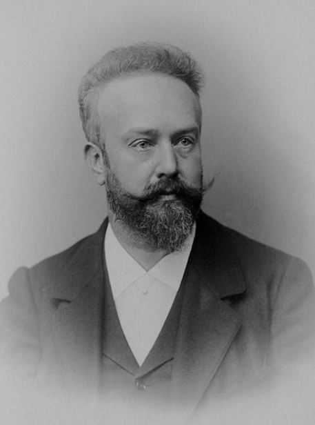 Photographie des Malers Paul Flickel, 1903